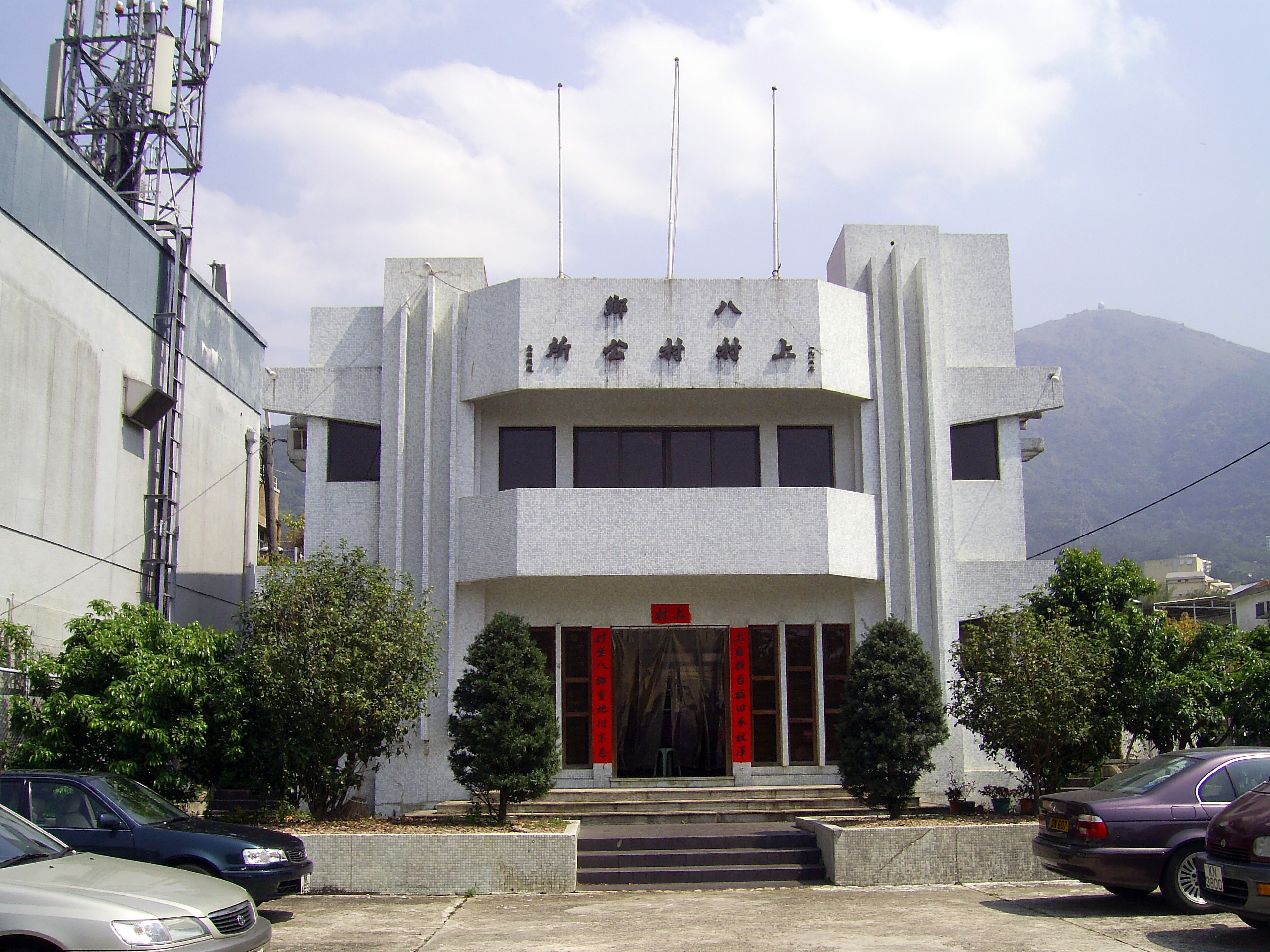 中文（香港）: 上村村公所